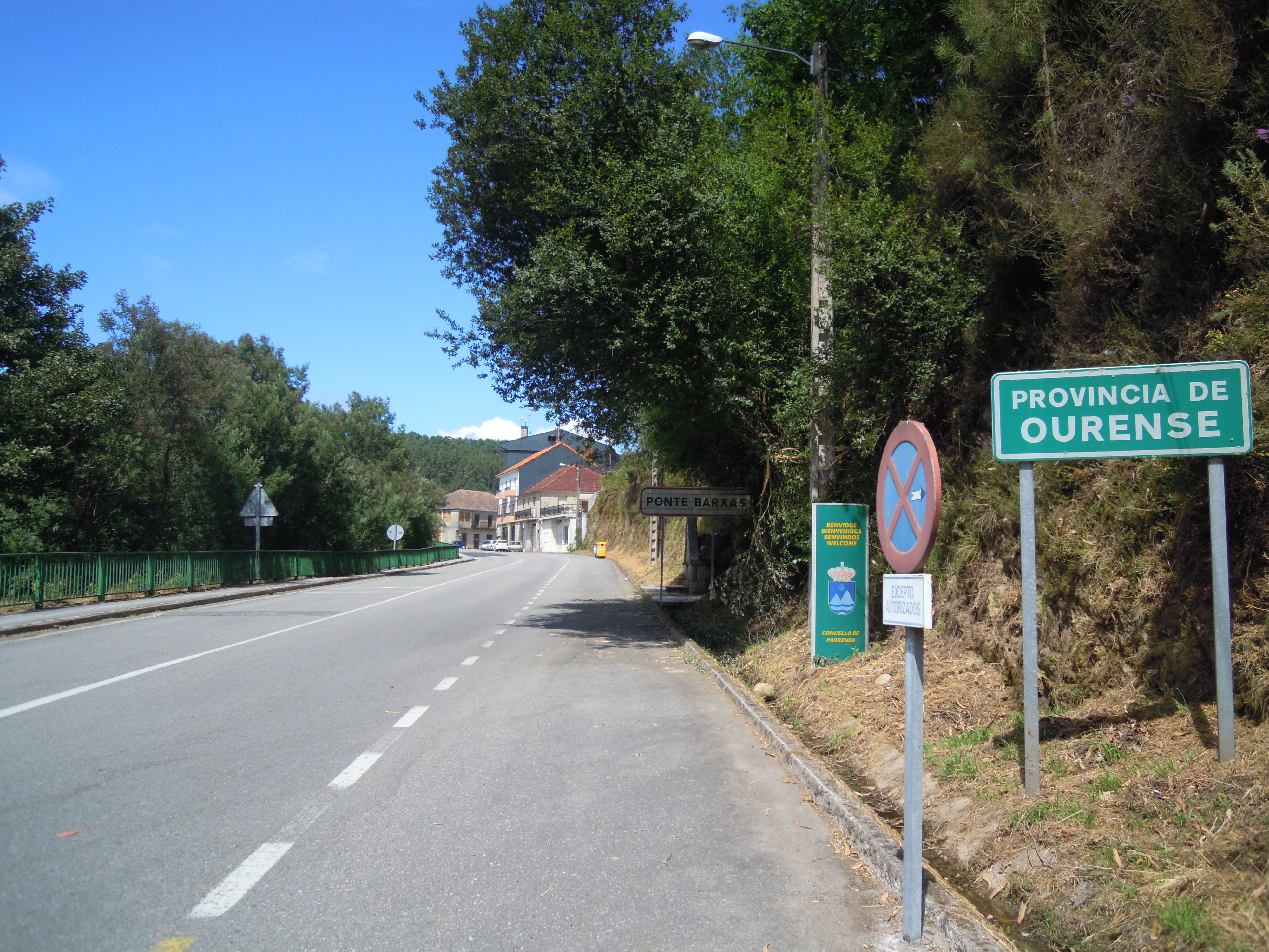 Estrada OU-801 na entrada a Ponte Barxas (Padrenda)